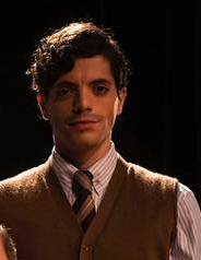 El elenco del "Relojero" integrado por Osmar Núñez, Horacio Roca, Stella Galazzi, Federico Salles, Martín Urbaneja y Laura Grandinetti en el Teatro Regio en 2017.